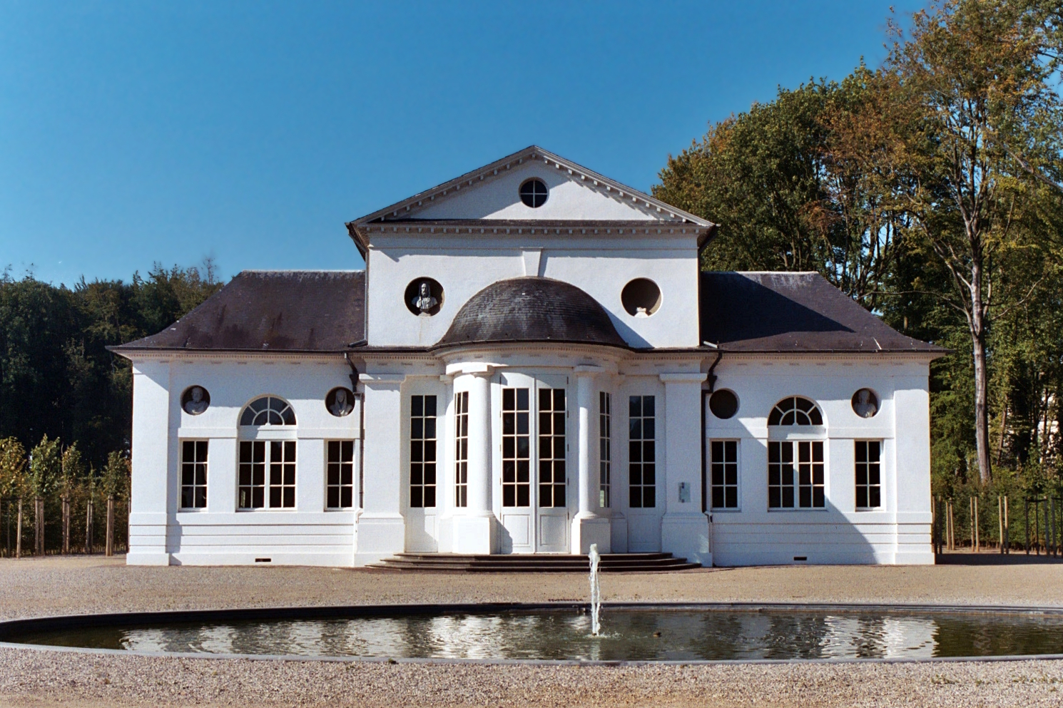 Belgique - Wallonie - Petit théâtre du château de Seneffe